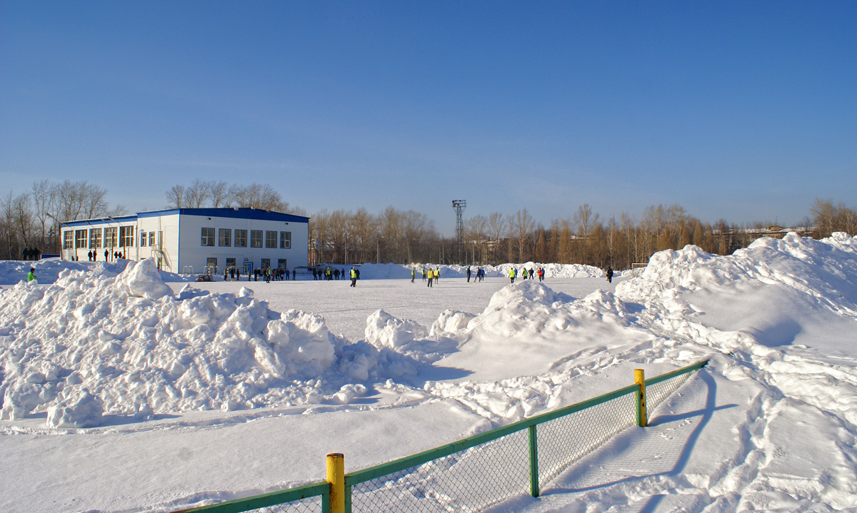 Стадион «Чайка» Самара, посёлок Управленческий, улица С.Лазо, 23а